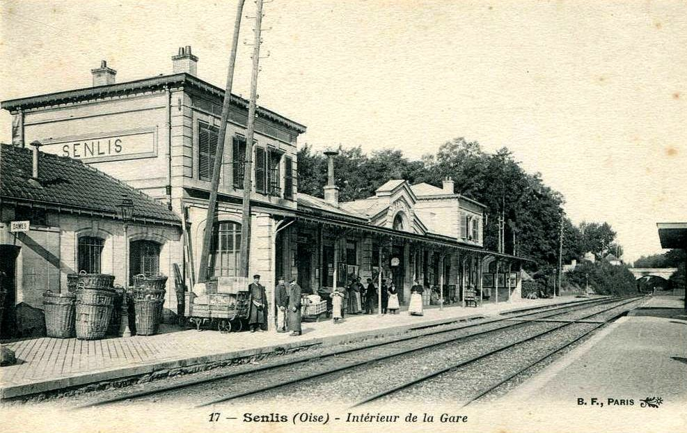 Le bâtiment-voyageurs de l'ancienne gare de Senlis côté voies, détruit par un incendie le 2 septembre 1914. L'architecture est caractéristique des lignes Paris-Creil et Paris-Laon de la Compagnie du Nord.